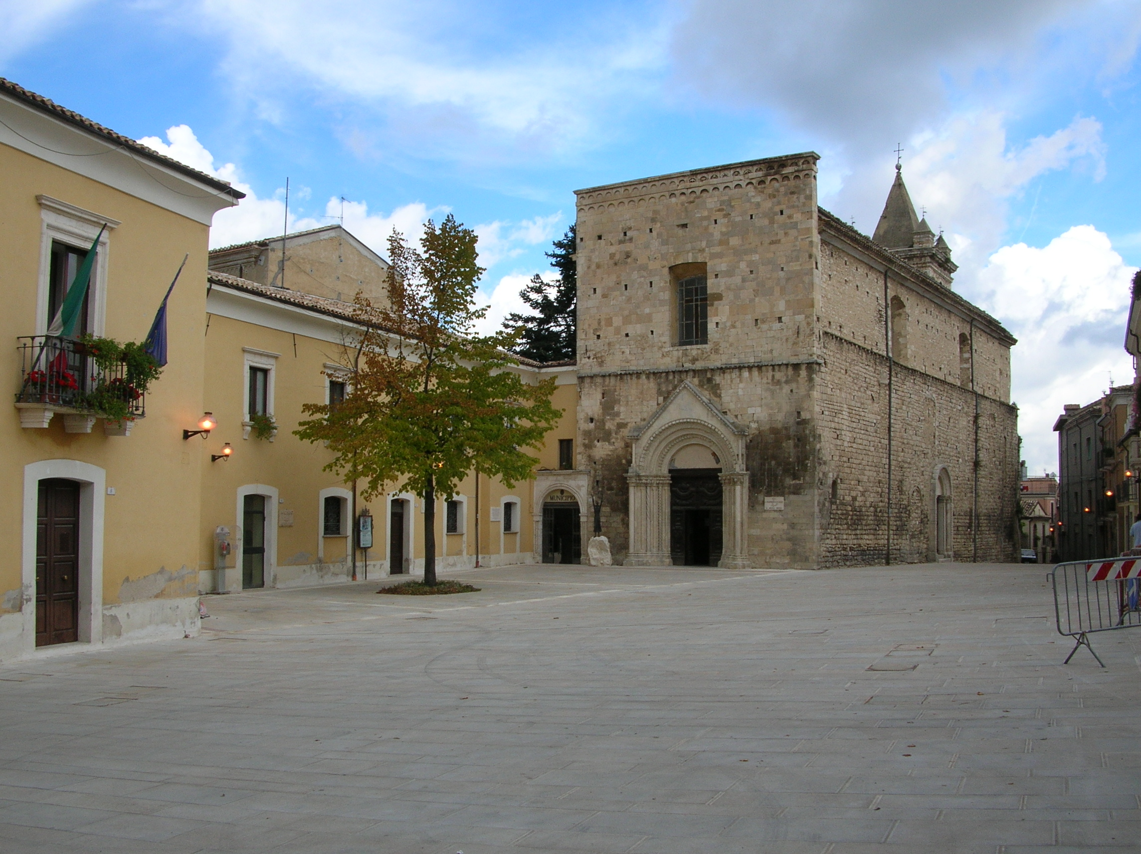 Piazza San Francesco a Guardiagrele; chiesa di San Nicola Greco (San Francesco) ed a sx della stessa il Municipio; la chiesa ed il palazzo comunale erano un tempo parte un unico edificio, convento dei Francescani (da qui il nome della piazza)